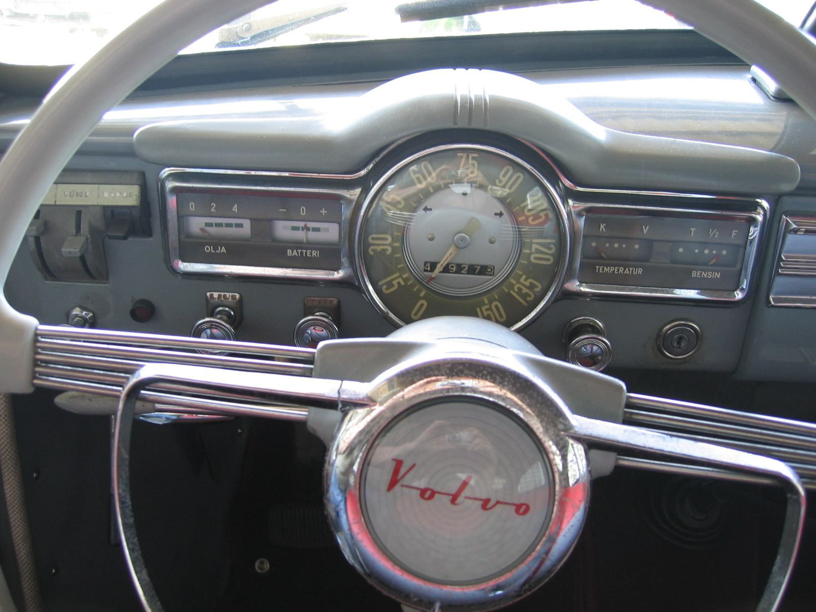 Armaturenbrett Volvo PV444. Links vom Tacho die neuere Ausführung der Anzeigeinstumente mit Strichen, rechts vom Tacho die ältere Ausführung mit Punkten.